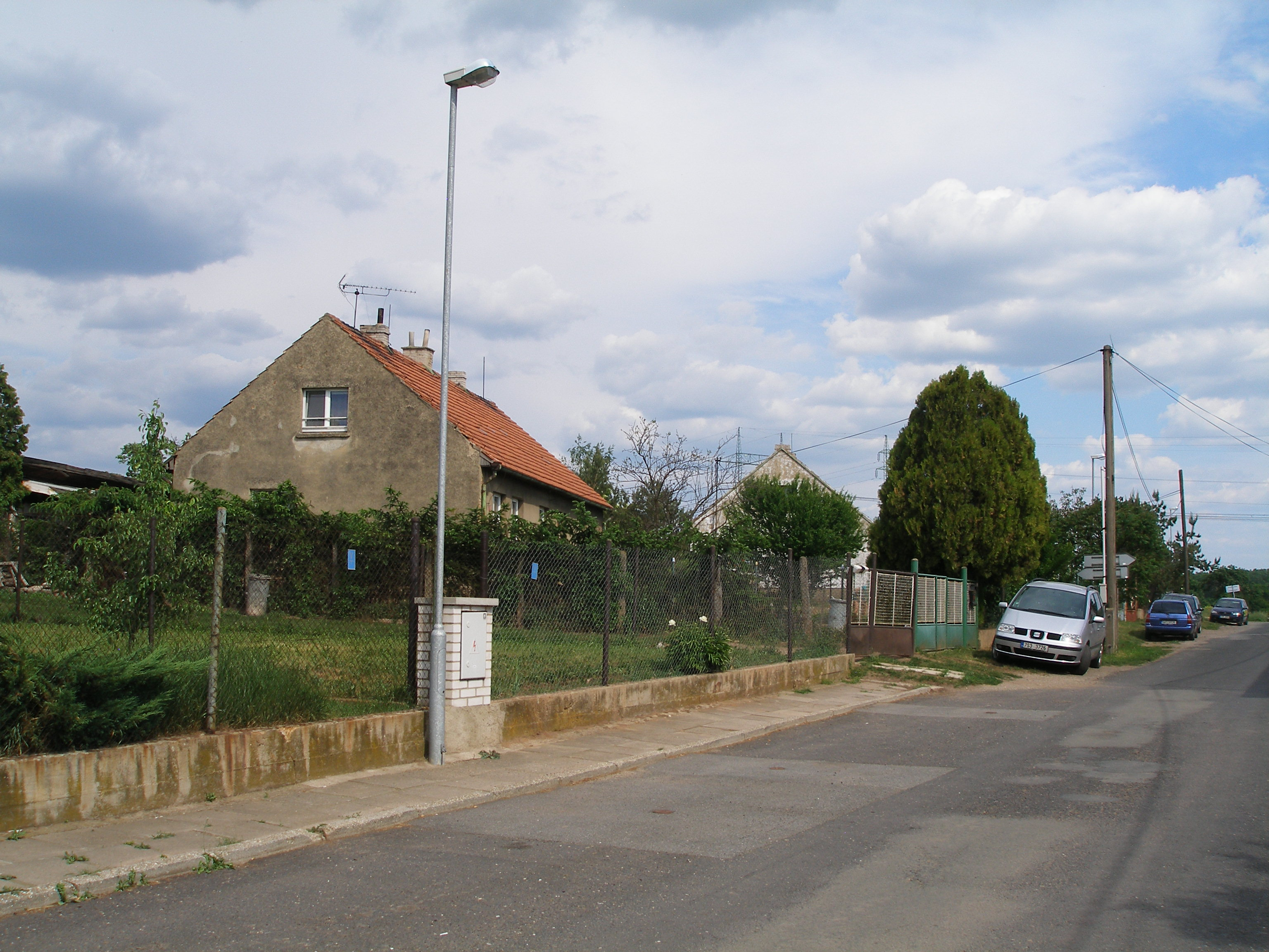 Ulice v Křovicích.